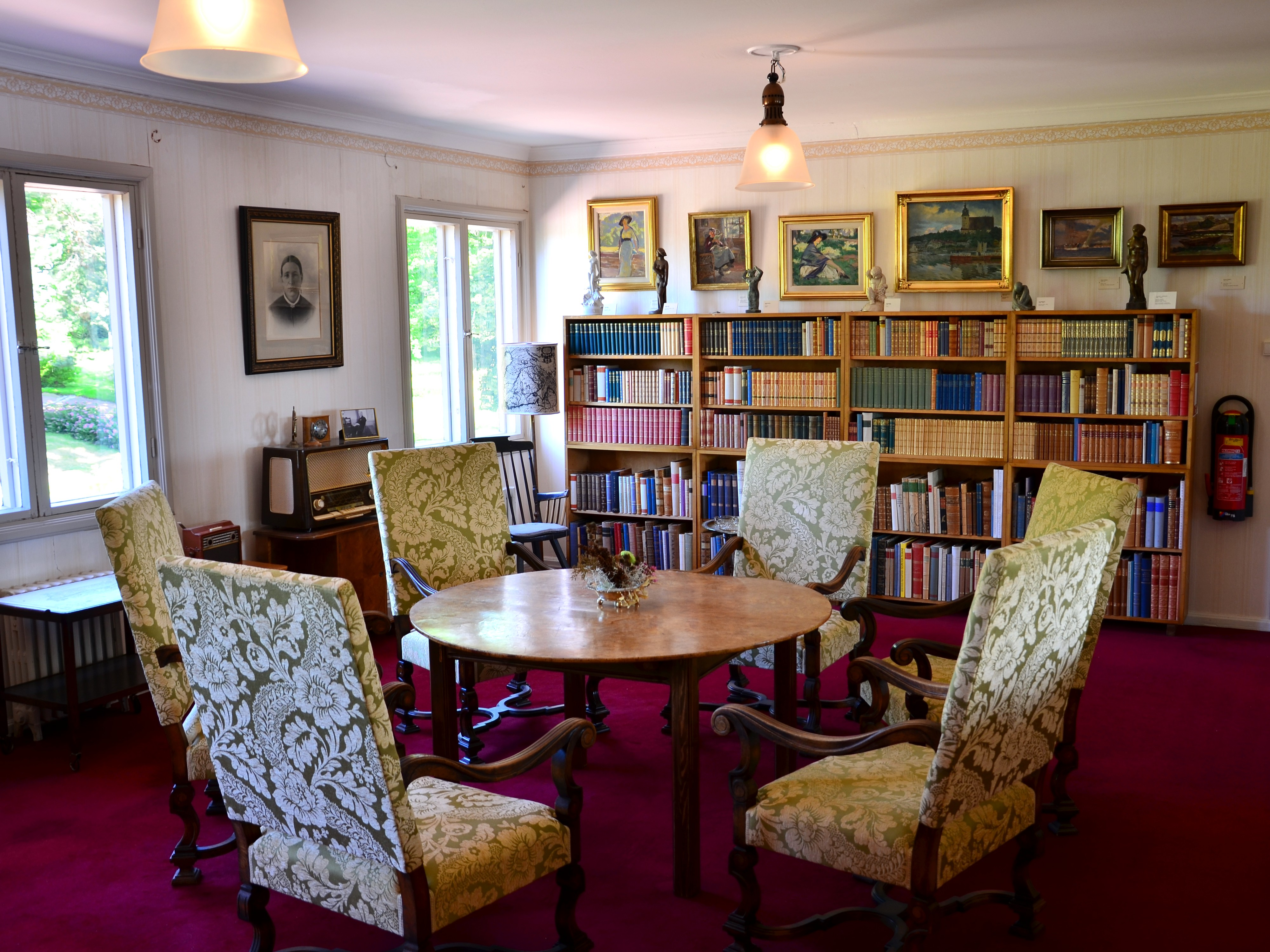 Biblioteket på övervåningen, Söderlångvik, Finland. Söderlångvik manor Native nameSöderlångviks museumParent institutionAmos Anderson Art MuseumLocationKimito island, FinlandCoordinates60° 02′ 00″ N, 22° 26′ 00″ E Established1961Web page control : Q6581530 institution QS:P195,Q6581530